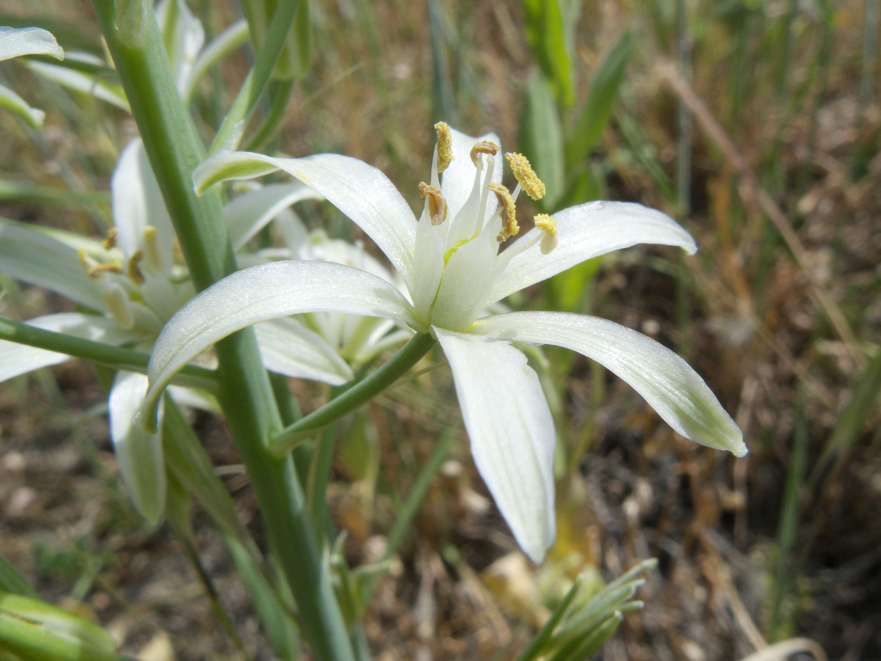 Ornithogalum narbonense (Hyacinthaceae, Asparagales). Madrid, España.